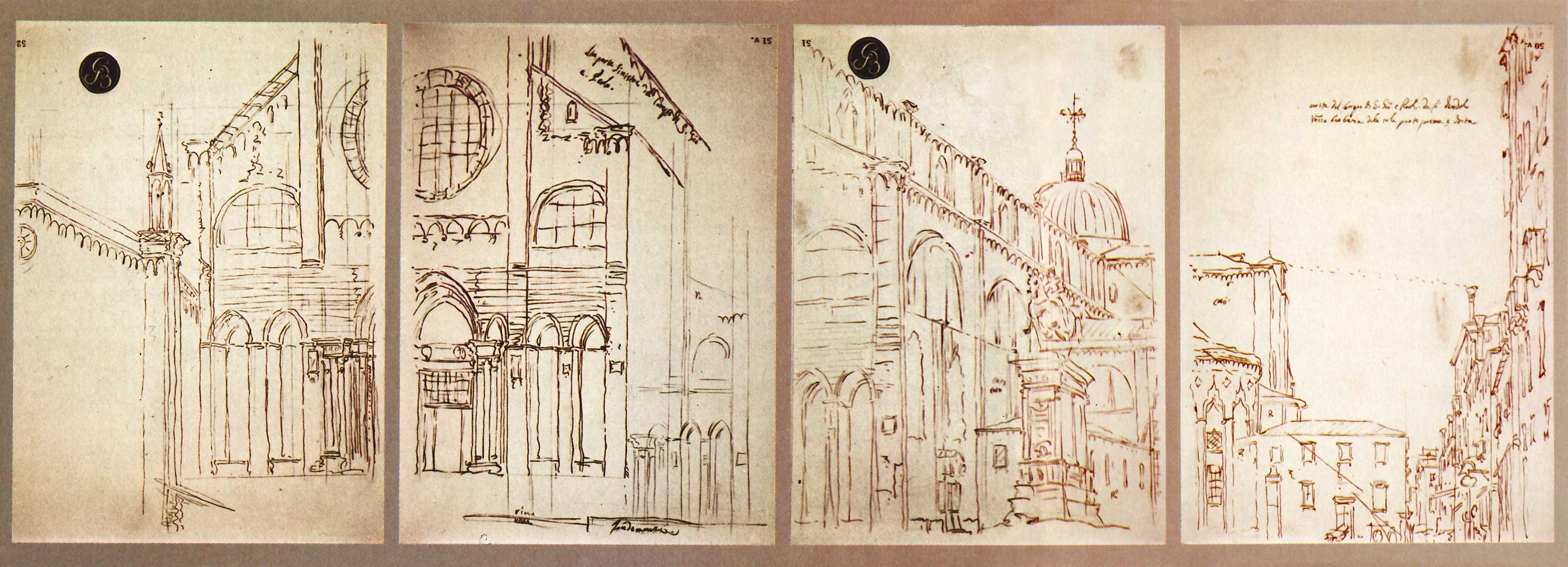 riproduzione di 4 disegni di Canaletto, raffiguranti Campo San Giovanni e Paolo a Venezia, ottenuti con una camera oscura. (Venezia, Gallerie dell'Accademia) 4 drawings by Canaletto, representing Campo San Giovanni e Paolo in Venice, obtained with a Camera obscura. (Venice, Gallerie dell'Accademia)